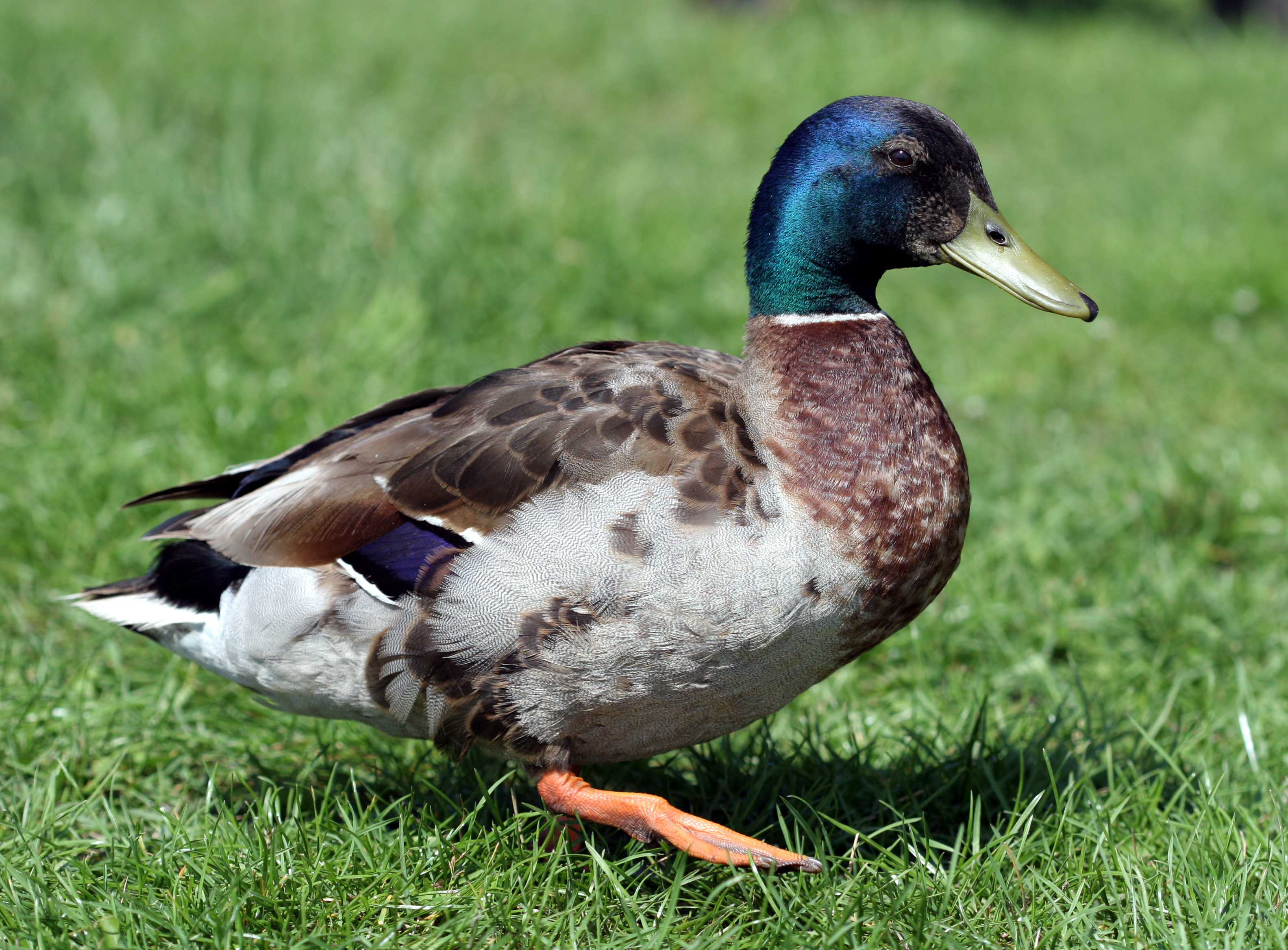 Männliche Stockente (Anas platyrhynchos) am Nord-Ostsee-Kanal.